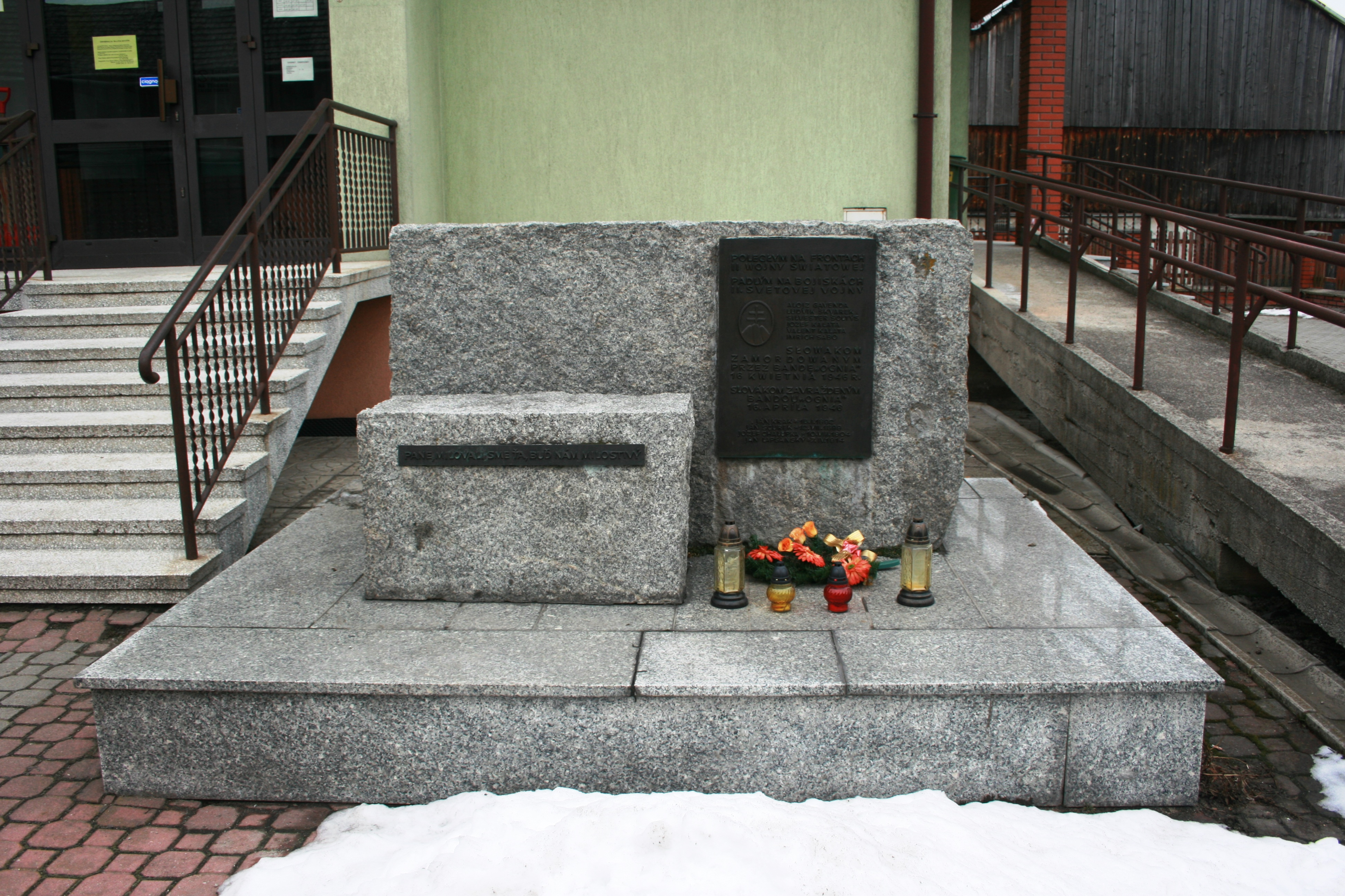 Pomnik Słowaków zabitych przez Bandę Ognia w 1946 roku w Nowej Białej w gminie Nowy Targ